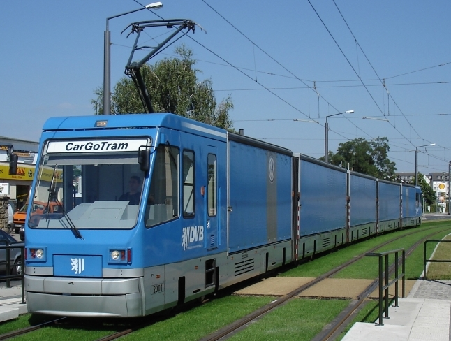 CarGoTram auf der Löbtauer Straße in Dresden